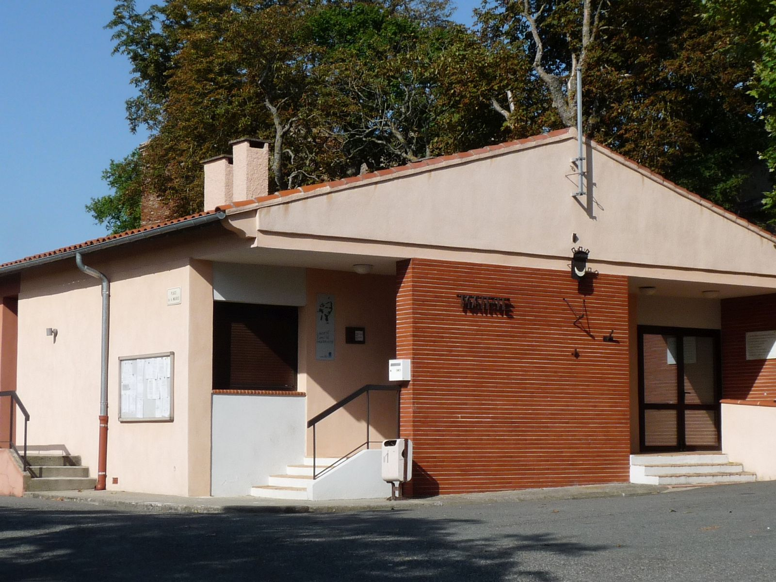 Mairie de Vallègue, Haute-Garonne, France